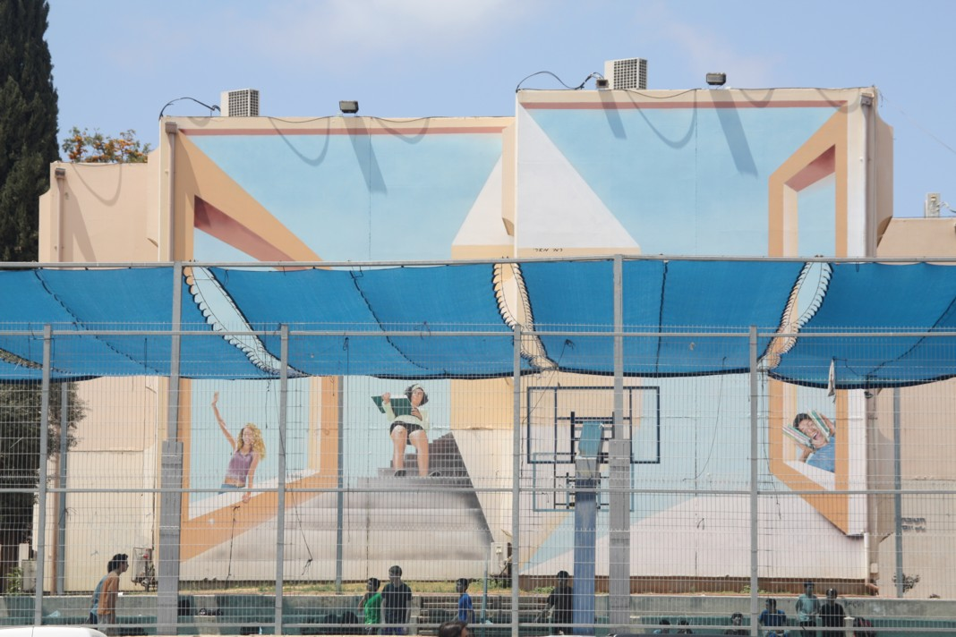 Kelman Junior High, Ramat Hasharon חטיבת הביניים ע"ש קלמן, רמת השרון